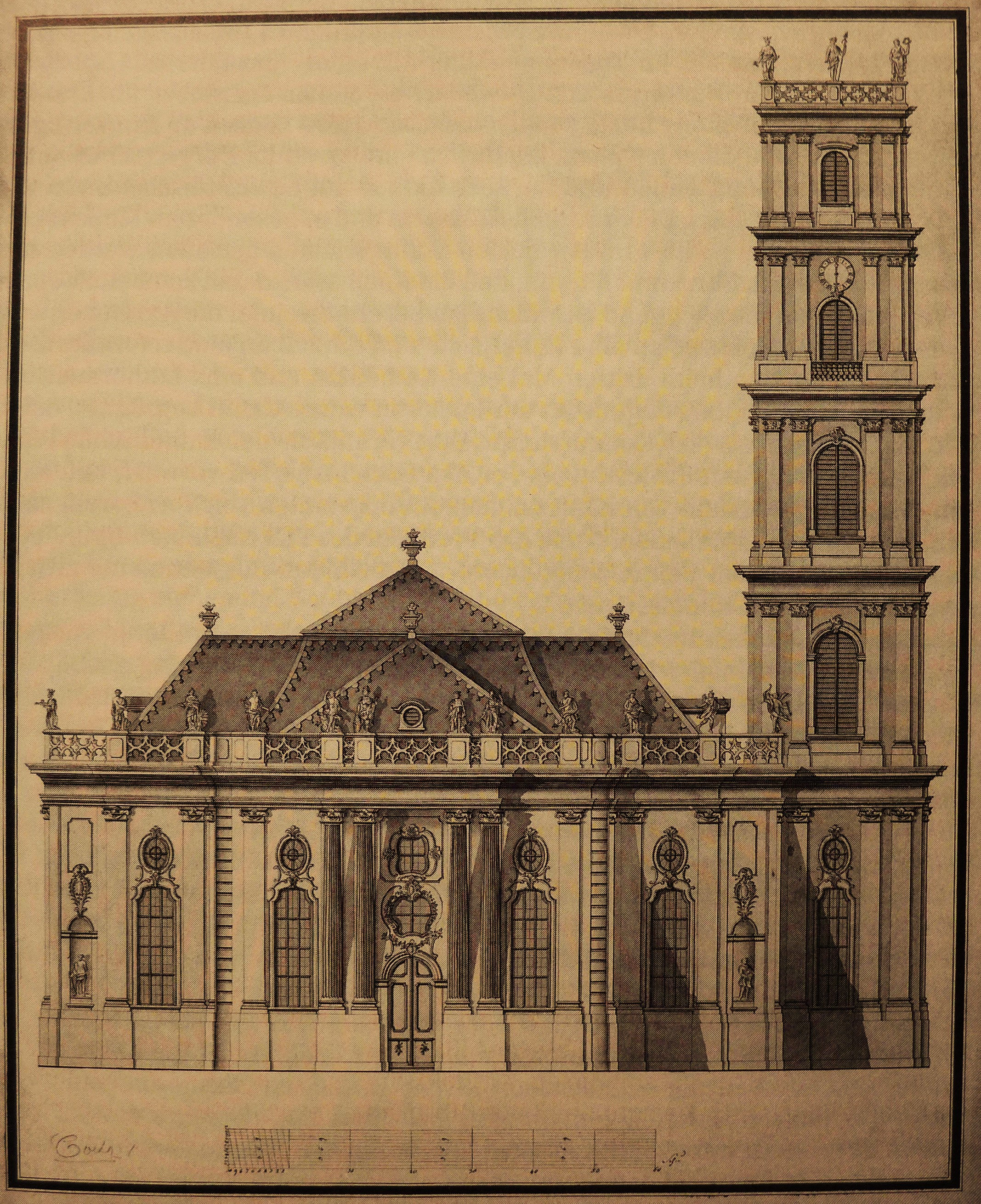 Seitenaufriss der Ludwigskirche für eine geplante Neugestaltung aus dem 19. Jahrhundert mit erhöhtem Turm und gotisierenden Balustraden (Stadtarchiv Saarbrücken)